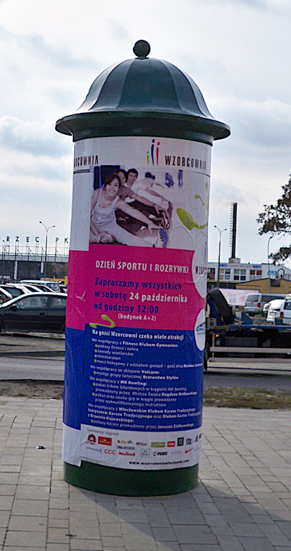 Słup ogłoszeniowy przy Wzorcowni Włocławek (2009 r.)